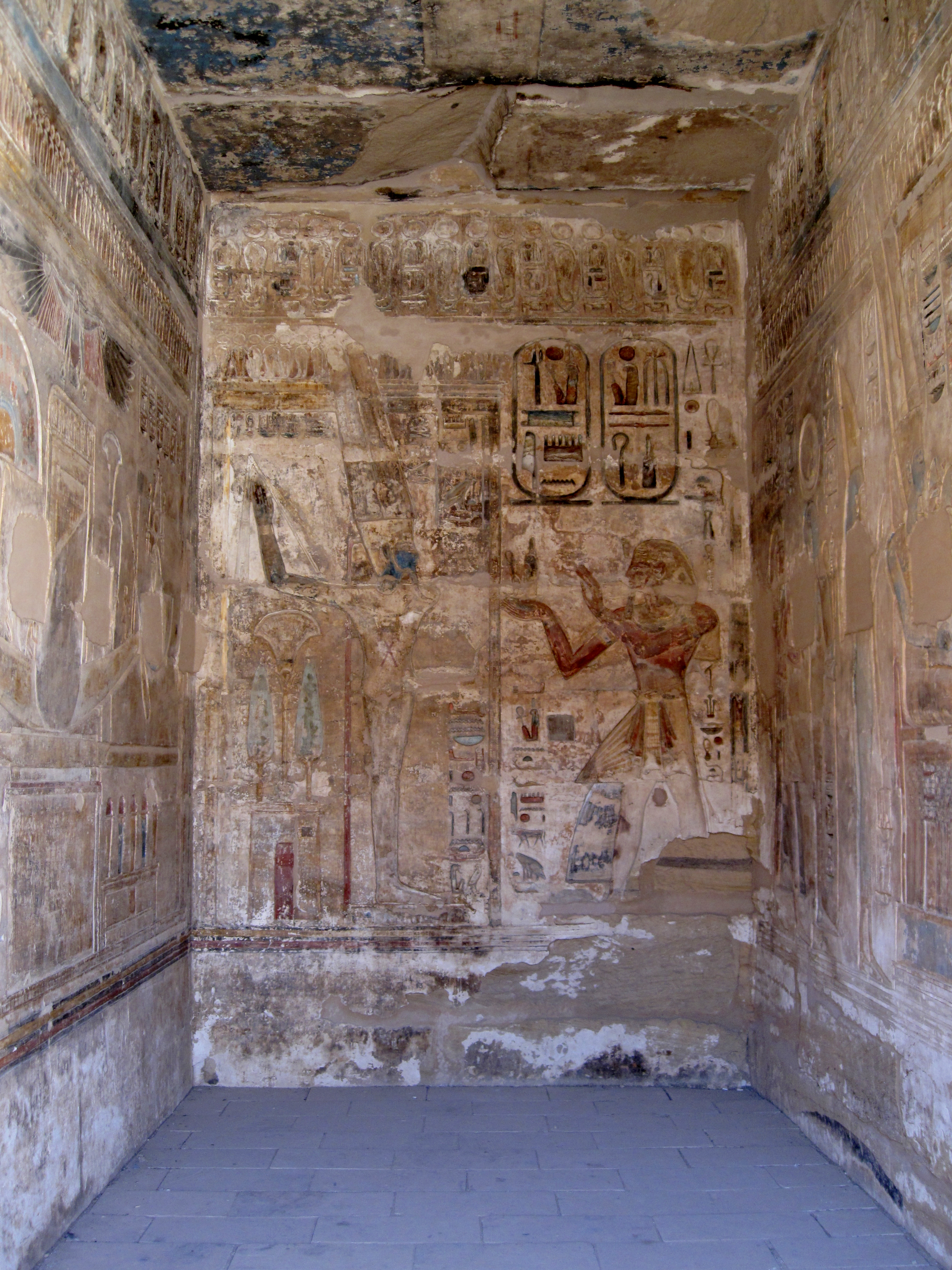 Kapelle im Totentempel Ramses’ III. in Medinet Habu, Ägypten